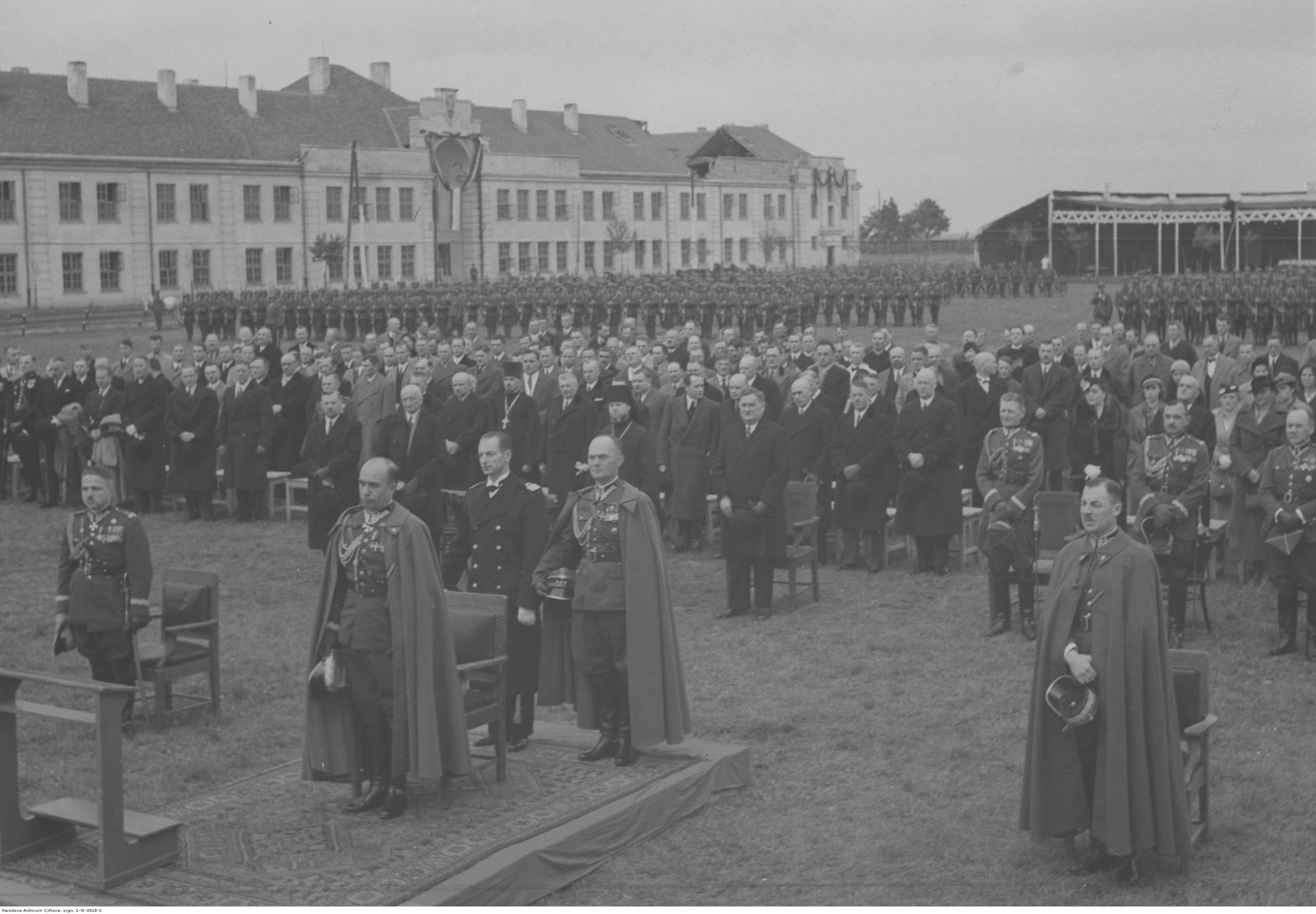 Uroczystość wręczenia sztandaru 84 Pułkowi Strzelców Poleskich, ufundowanego przez społeczeństwo poleskie. Msza polowa - na pierwszym planie gen. Tadeusz Kasprzycki. Koncern Ilustrowany Kurier Codzienny - Archiwum Ilustracji. Sygnatura: 1-W-3018-2